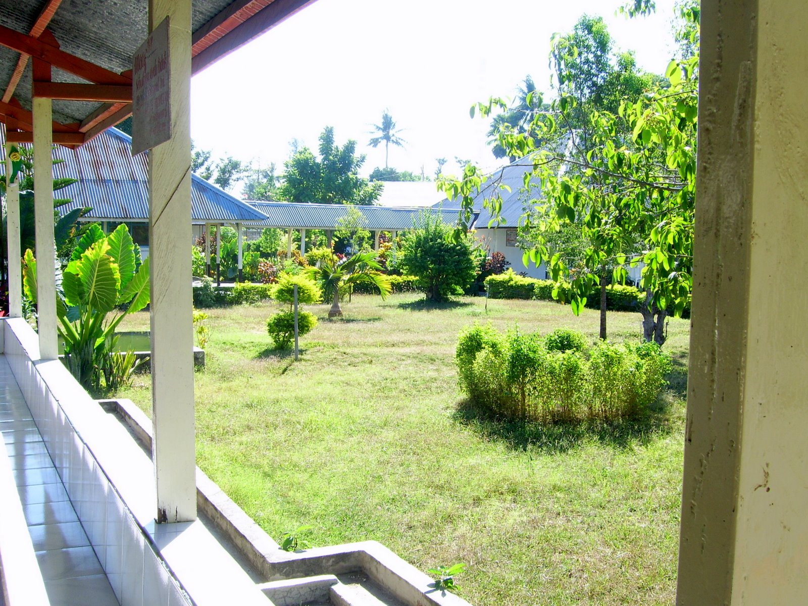 Hospital in Pajeti near Waingapu, Sumba